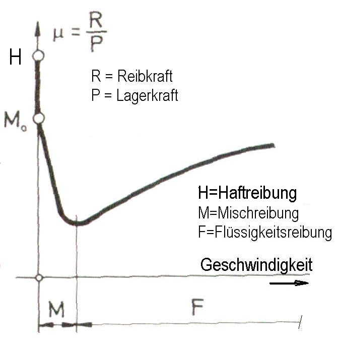 Stribeck-Kurve: Reibungskoeffizient μ in einem Gleitlager in Abhängigkeit von der Relativgeschwindigkeit zwischen den Gleitflächen